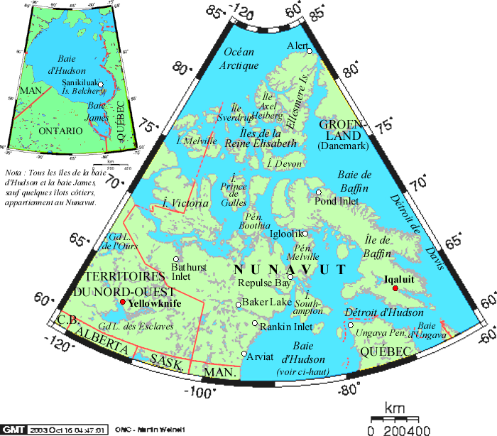 Carte du Nunavut (créée par Montréalais) Catégorie:Carte du Canada